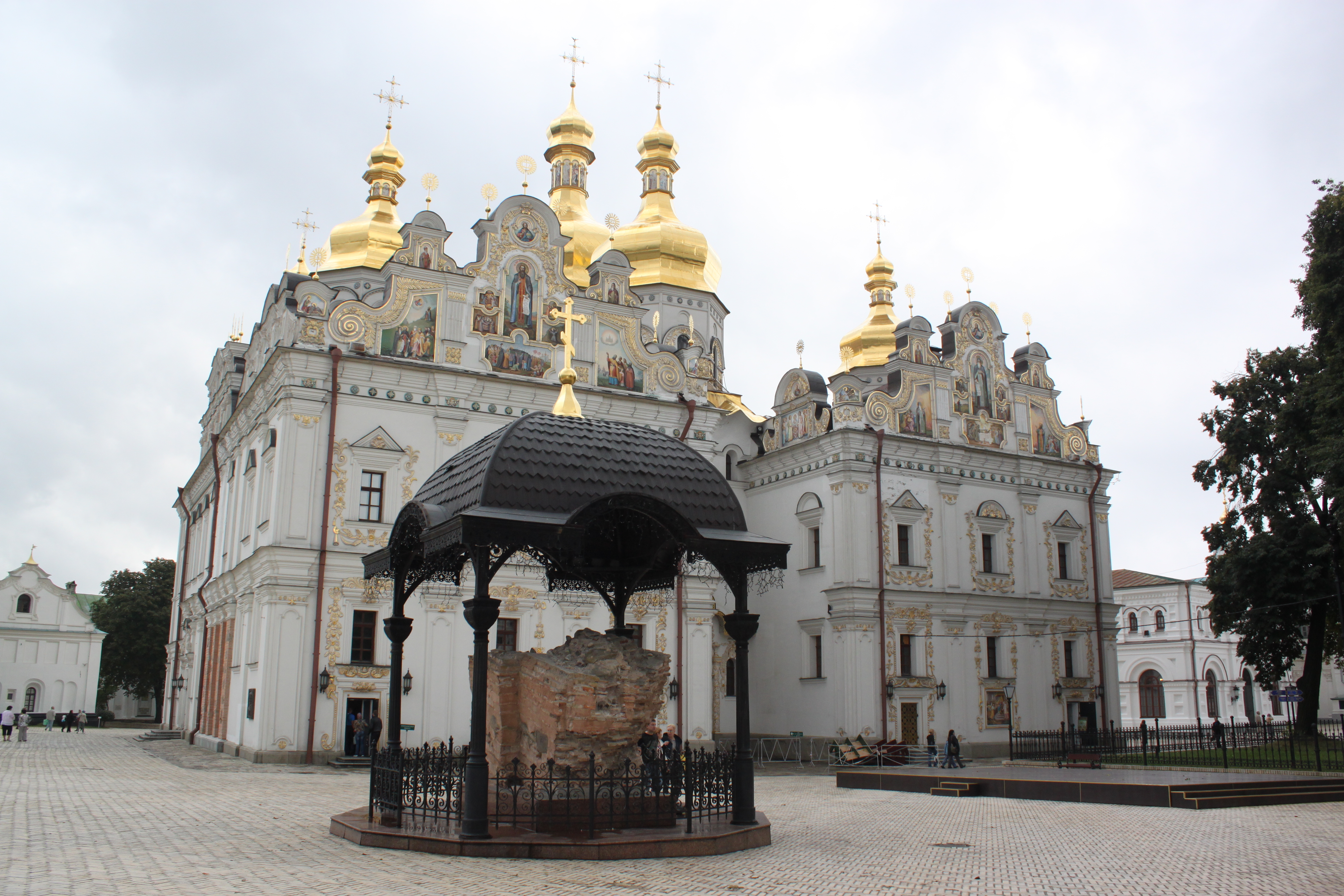 На теріторії Лаври